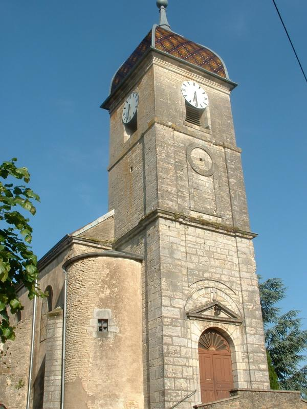 Esprels